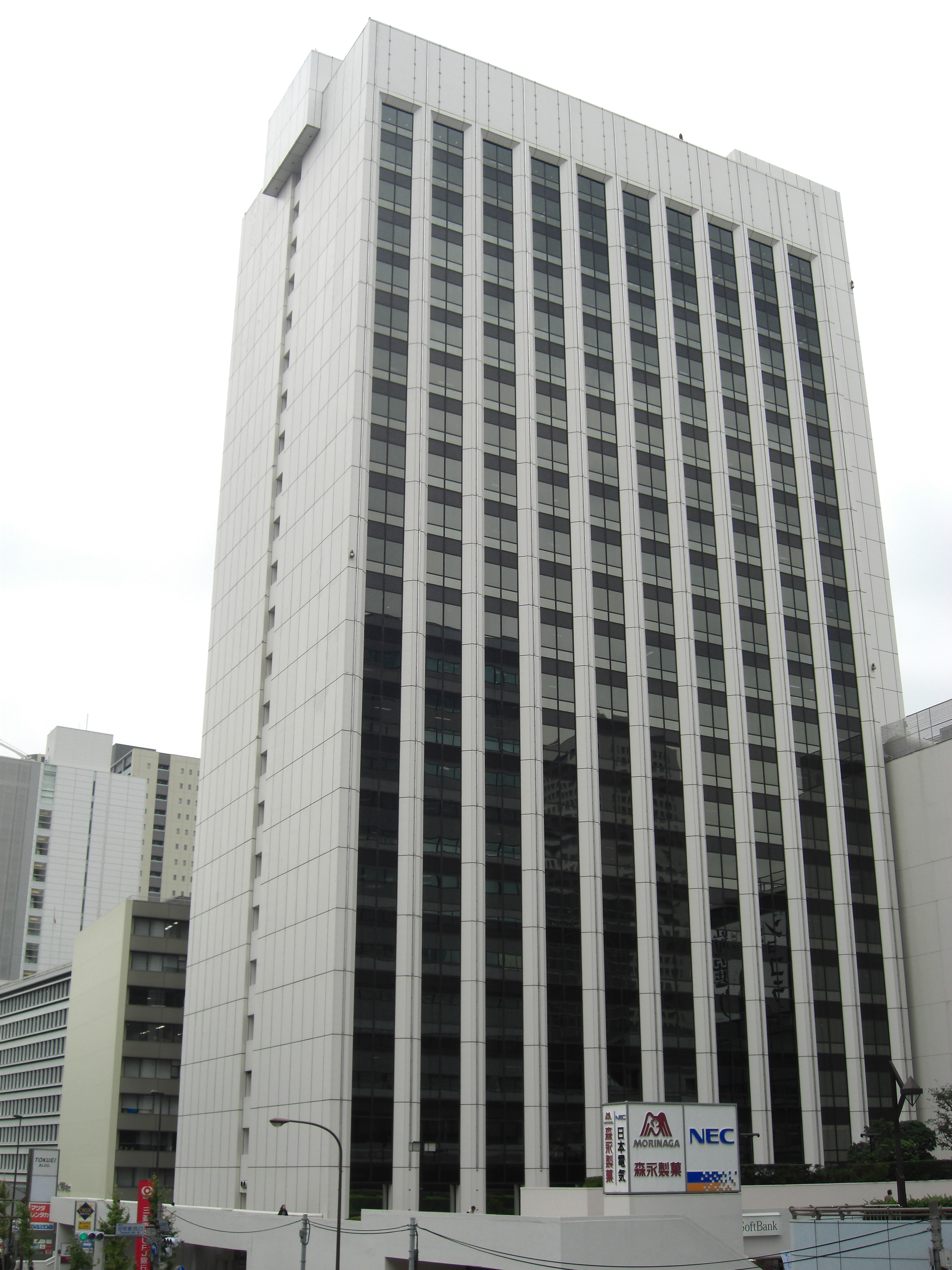 Morinaga plaza building(33-1,Shiba 5-chome,Minato-ku,Tokyo,Japan)